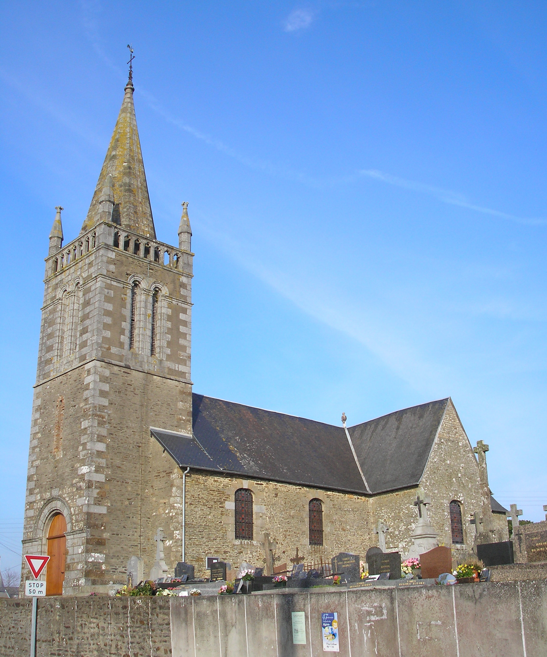 Vergoncey (Normandie, France). L'église Saint-Hilaire.